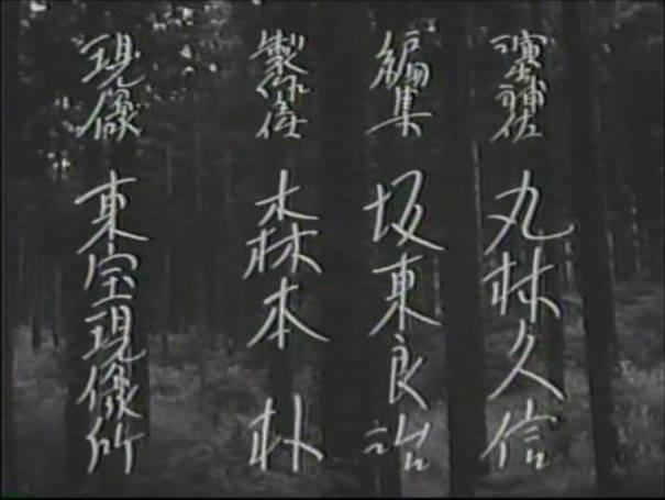 『せきれいの曲』、1951年、カットタイトル